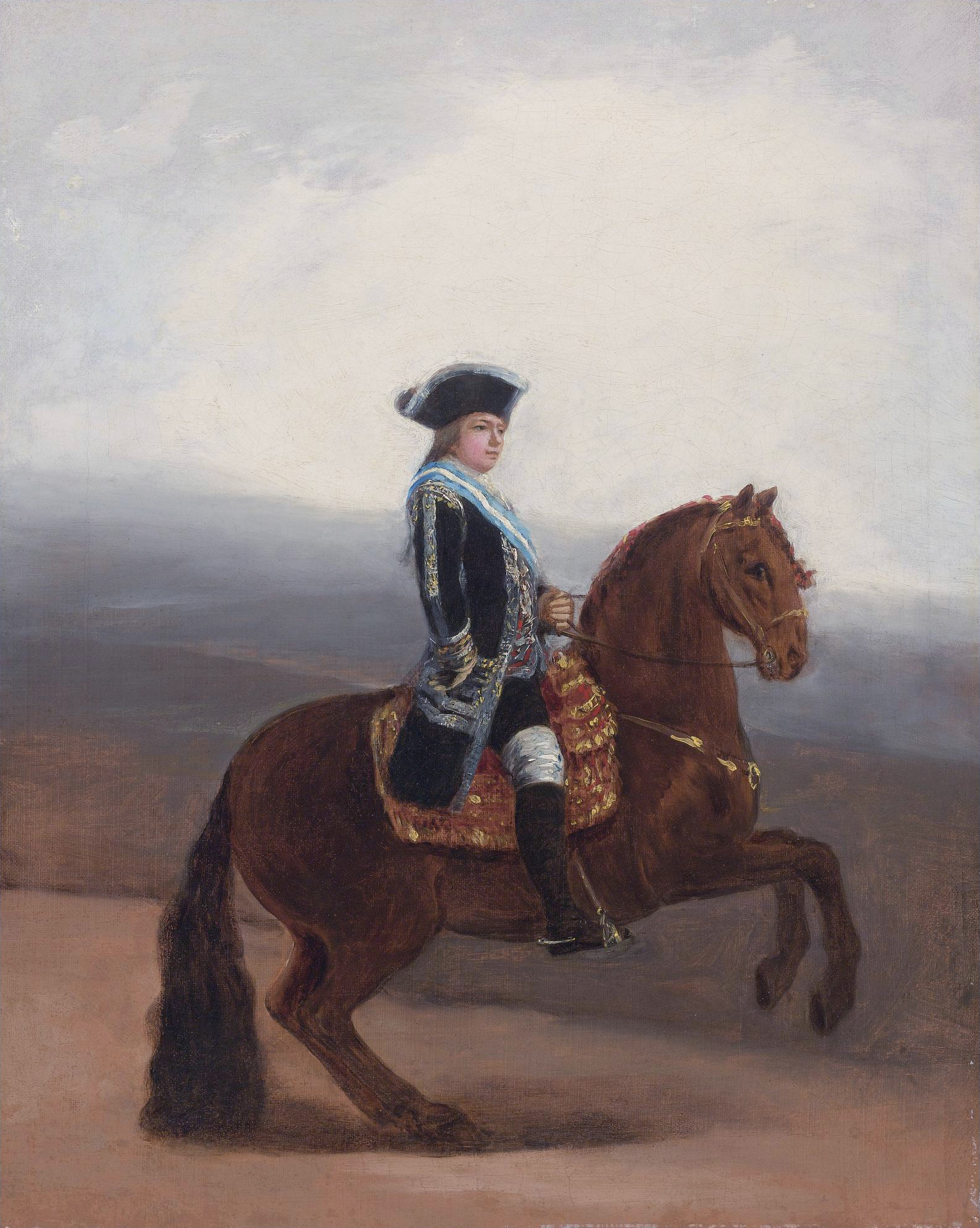 Boceto para el retrato ecuestre de Manuel Godoy, duque de la Alcudia